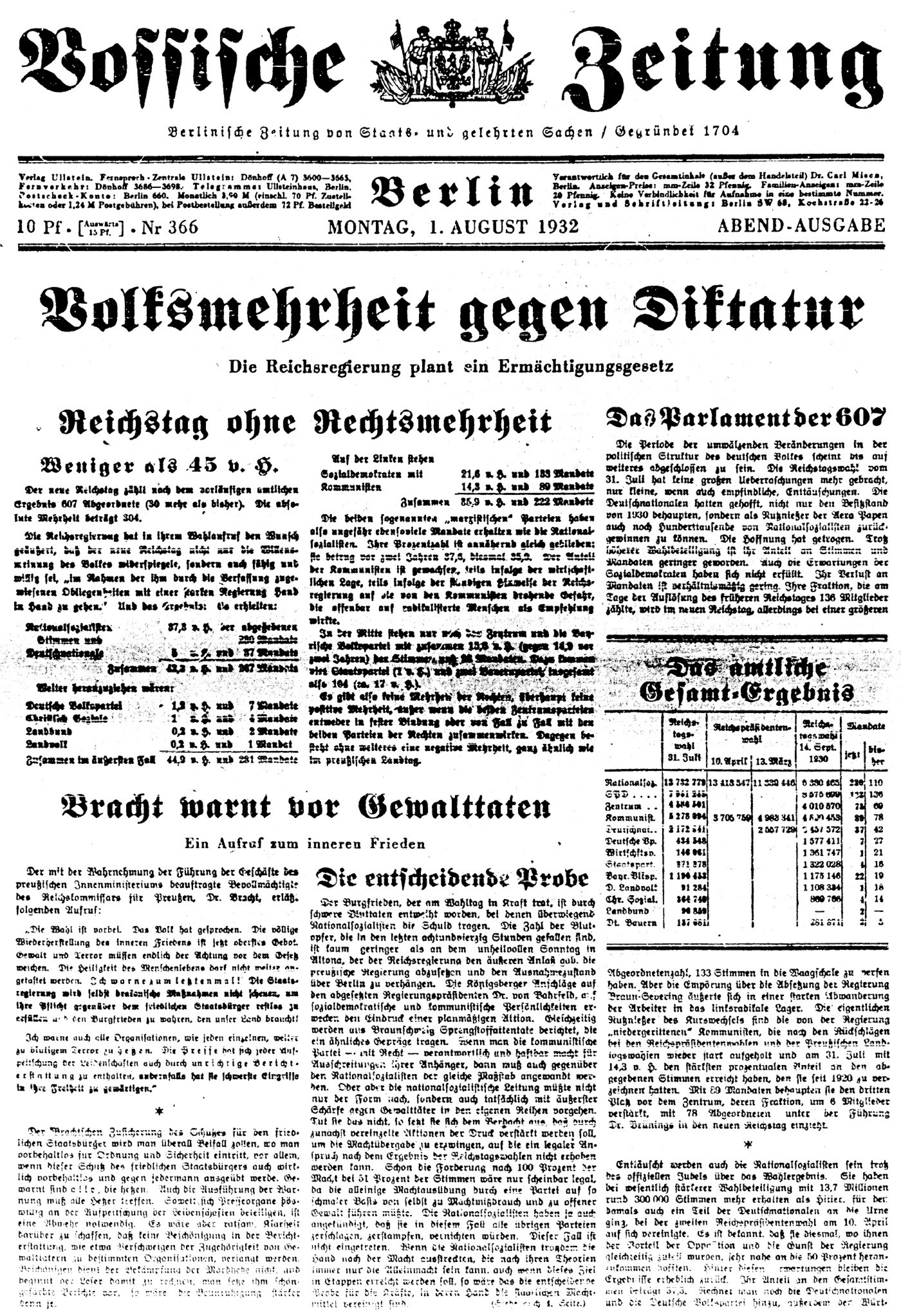 "Vossische Zeitung", Berlin. Title-page.